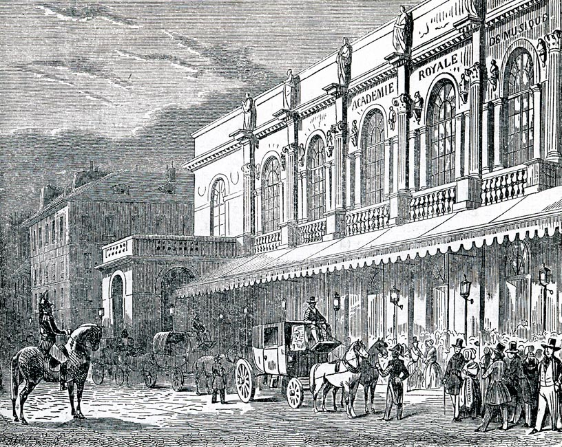 Opera Le Peletier par A. Provost 1844